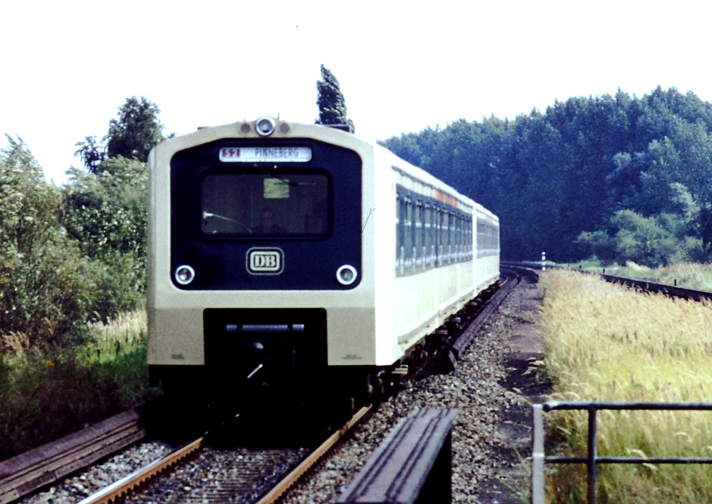 DB treinstel van het type 472 voor S-Bahn Hamburg. Hier ingezet op S2.